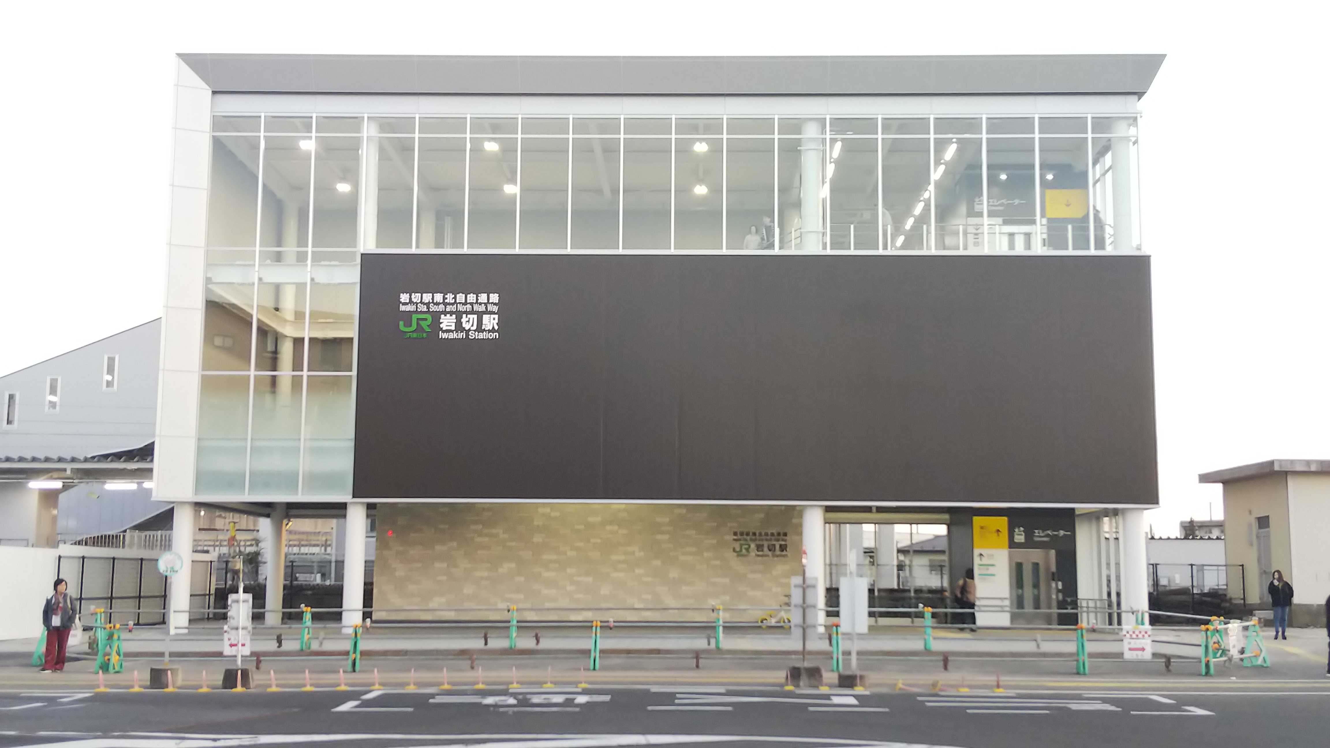 岩切駅北口